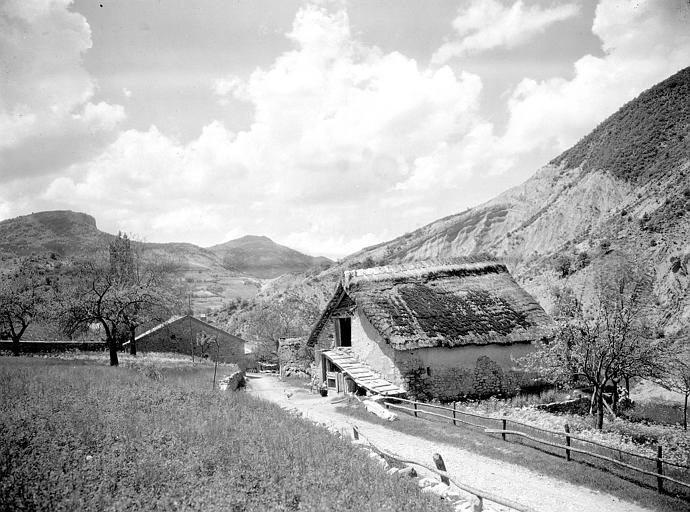 Bergerie à Bonneval en Diois (Drôme), vers 1925, Georges-Louis Arlaud